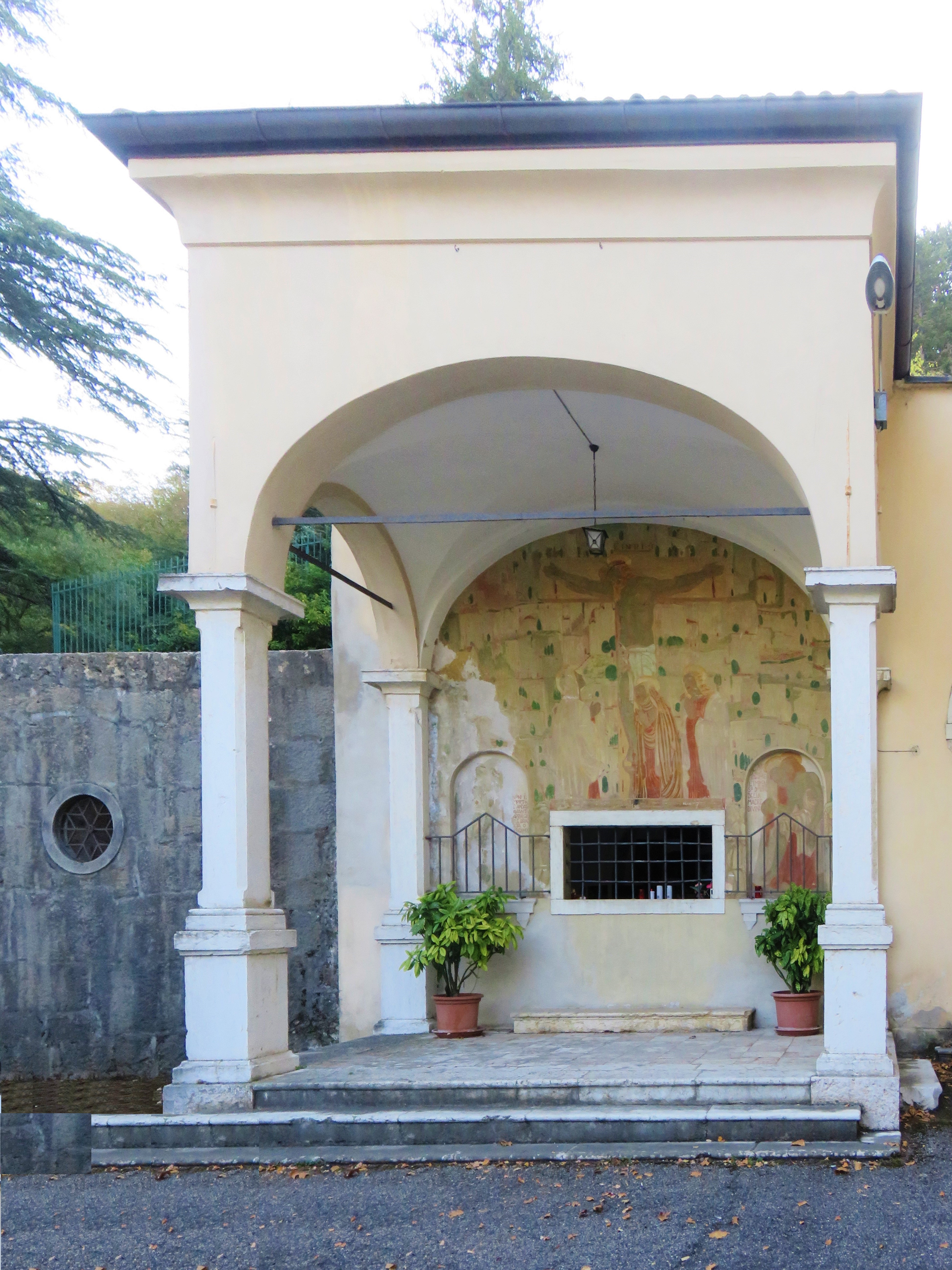 Cappella Sepolcro del Cristo, o cappella del Cristo morto, ultima stazione della Via Crucis di via Madonna del Monte, con affreschi del 1735 di Donati